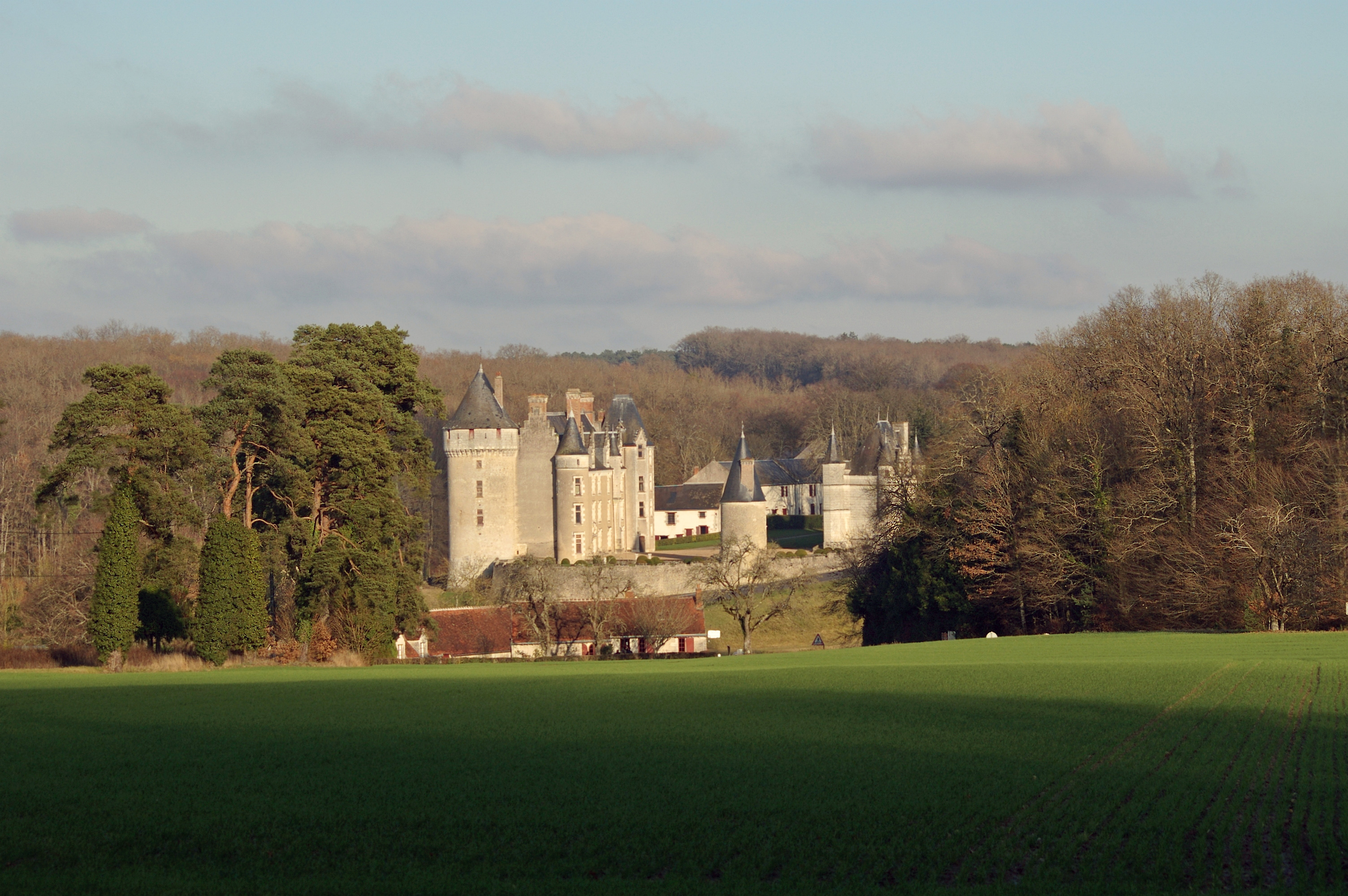 Schloss Montpoupon von Südosten